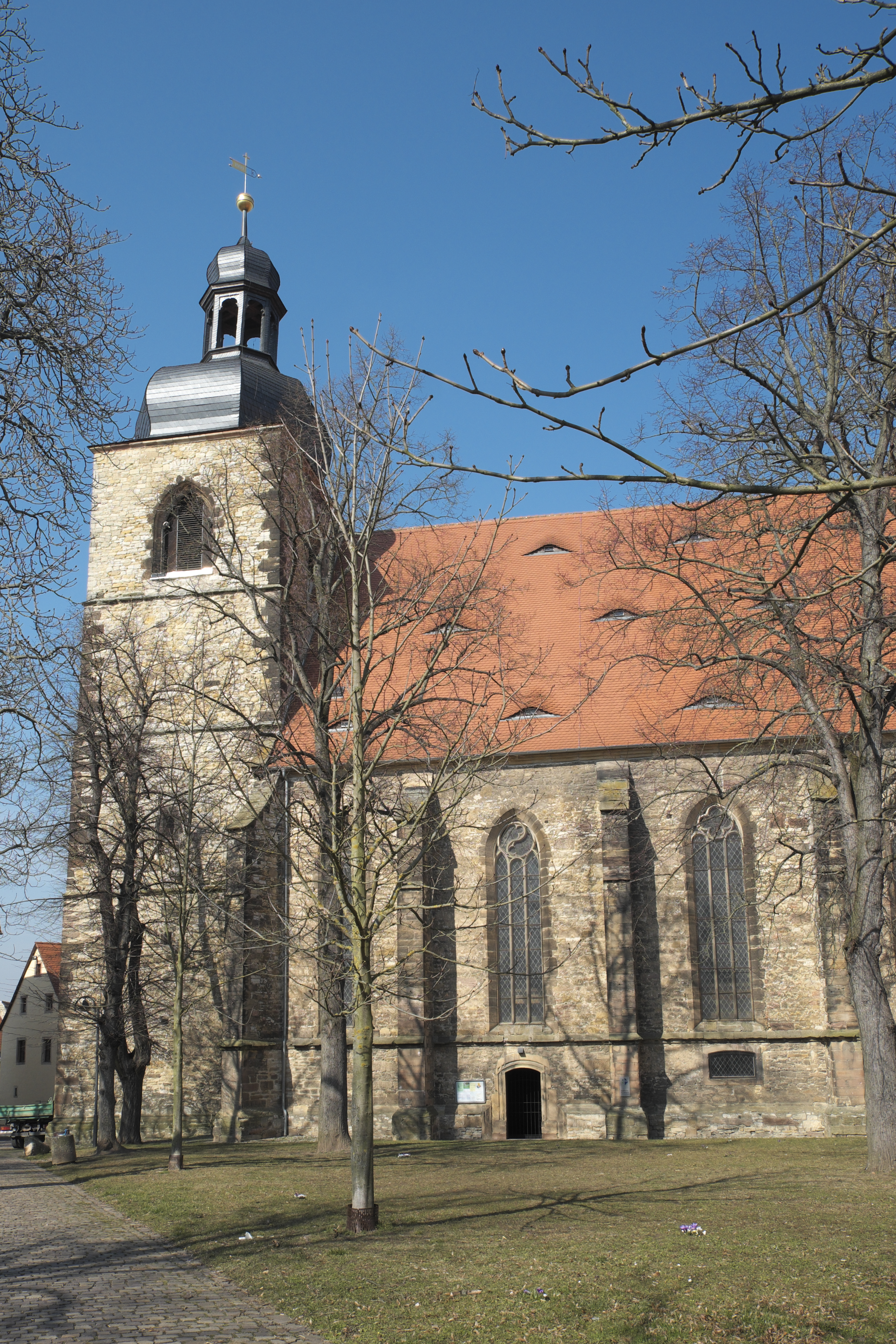 Stadtkirche St. Lamperti in Querfurt im Saalekreis in Sachsen-Anhalt/Deutschland